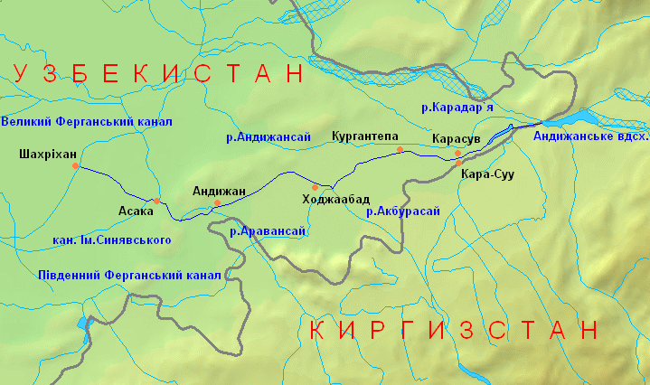 Мапа каналу Шахріхансай